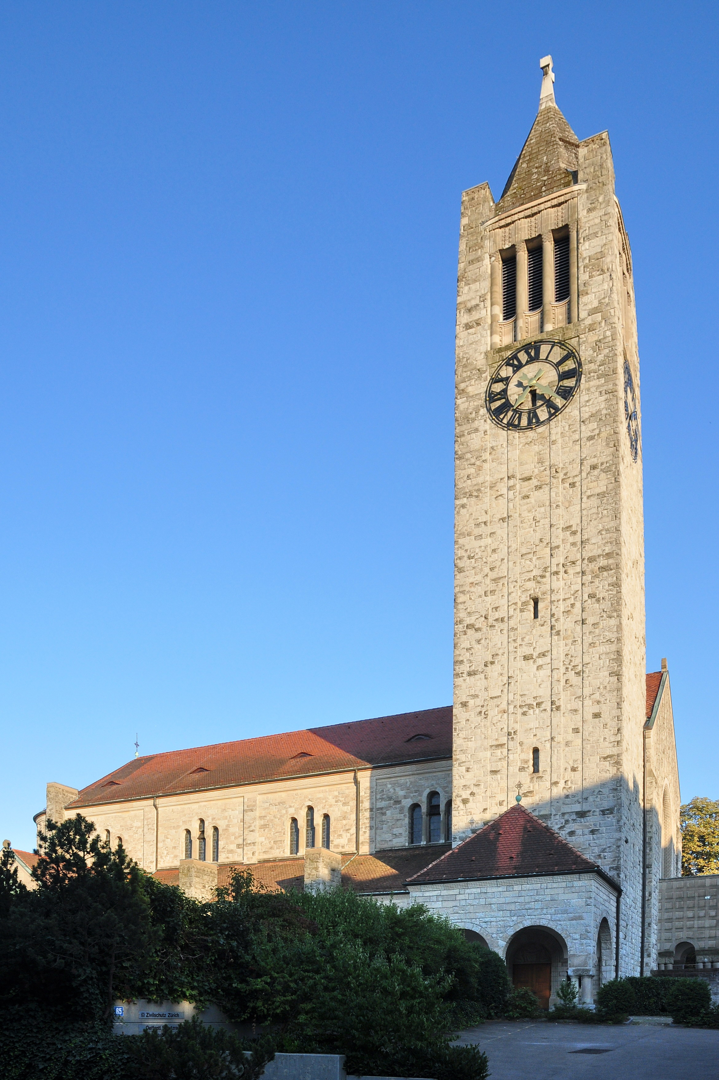 Katholische Kirche St. Antonius in Zürich-Hottingen (Switzerland)